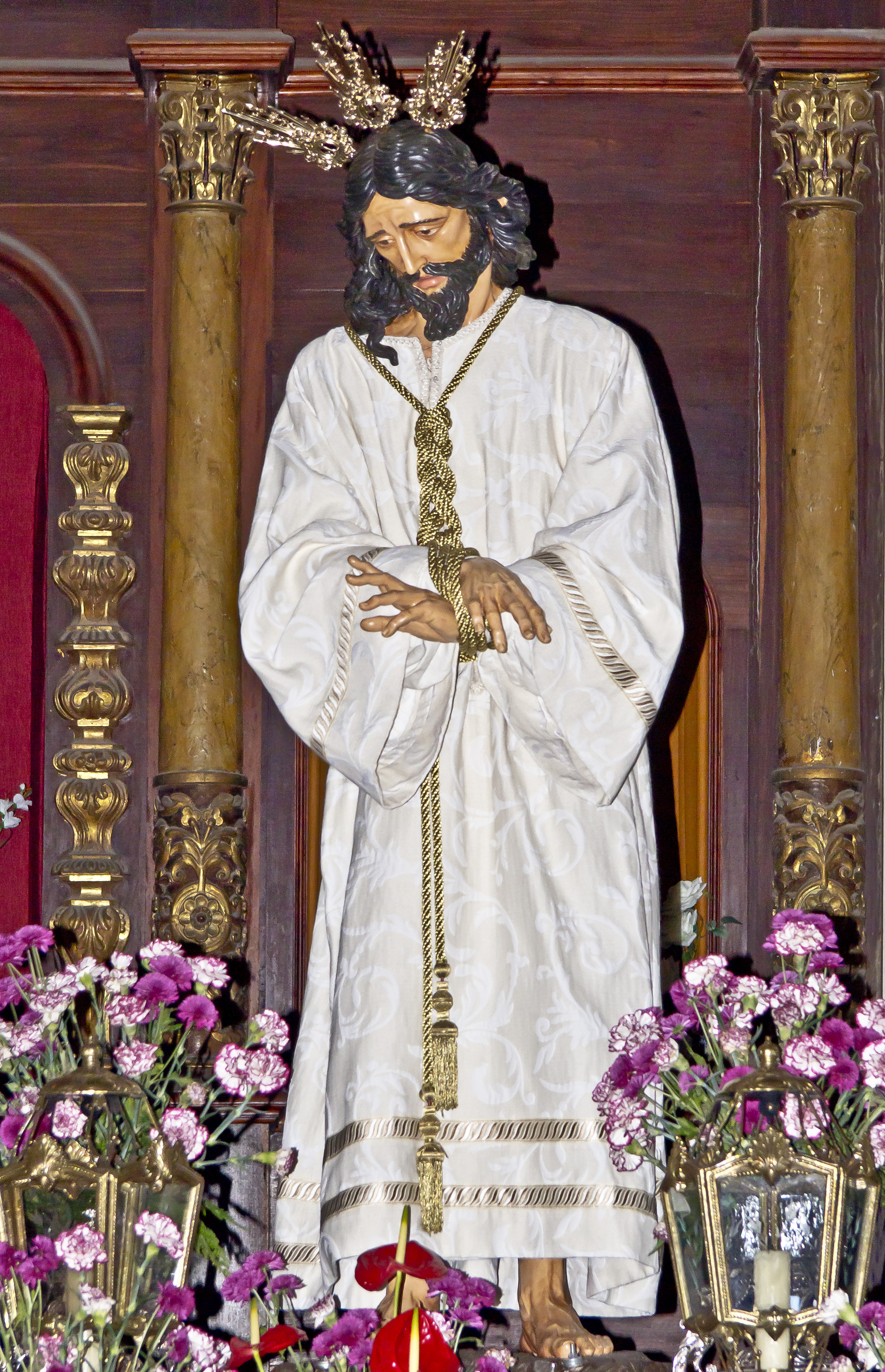 Christusfigur „Nuestro Padre Jesús Cautivo” von Juan Delgado Martín-Prat in der Kirche Nuestra Señora de la Concepción in Santa Cruz de Tenerife. Die Figur befindet sich hier auf der Transporteinrichtung für die Prozession. Sie ist hier in der Bekleidung der Fastenzeit zu sehen.